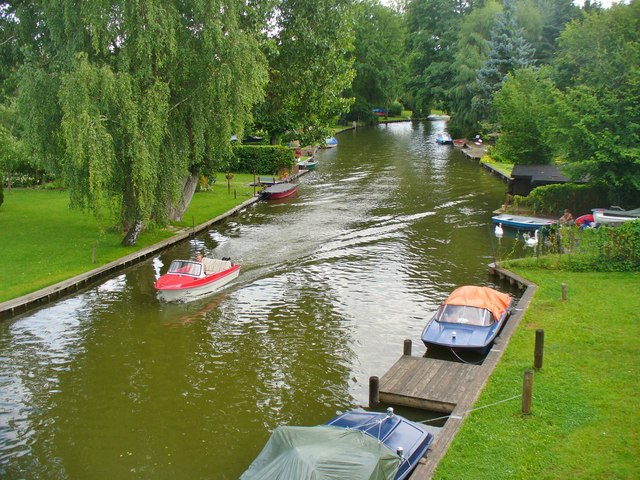 Alt Ruppin - Rhin